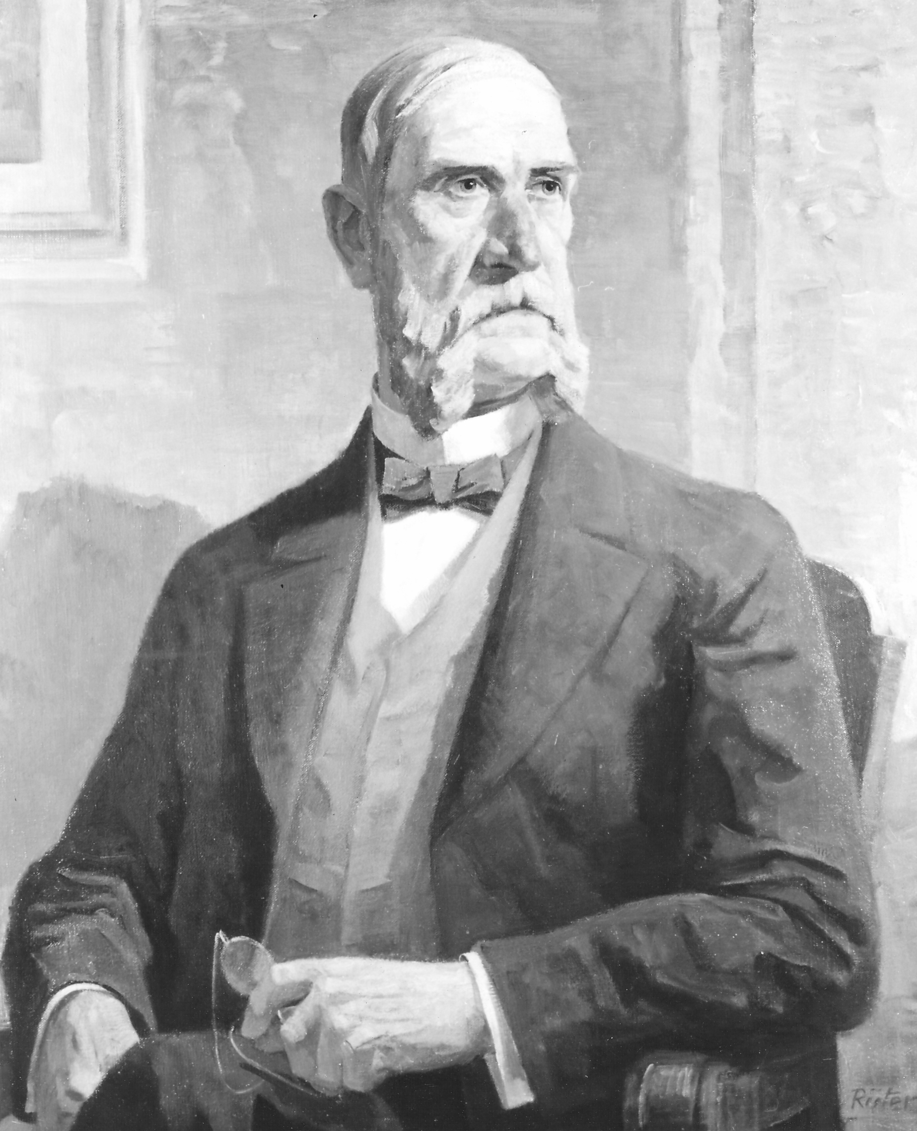 Theodor Wille (1890). Mitbegründer der Commerz- und Discontobank.